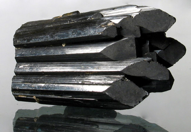 turmalin szerl, pochodzenie Madagaskar; autor zdjęcia Stowarzyszenie Spirifer; 22.08.2006r